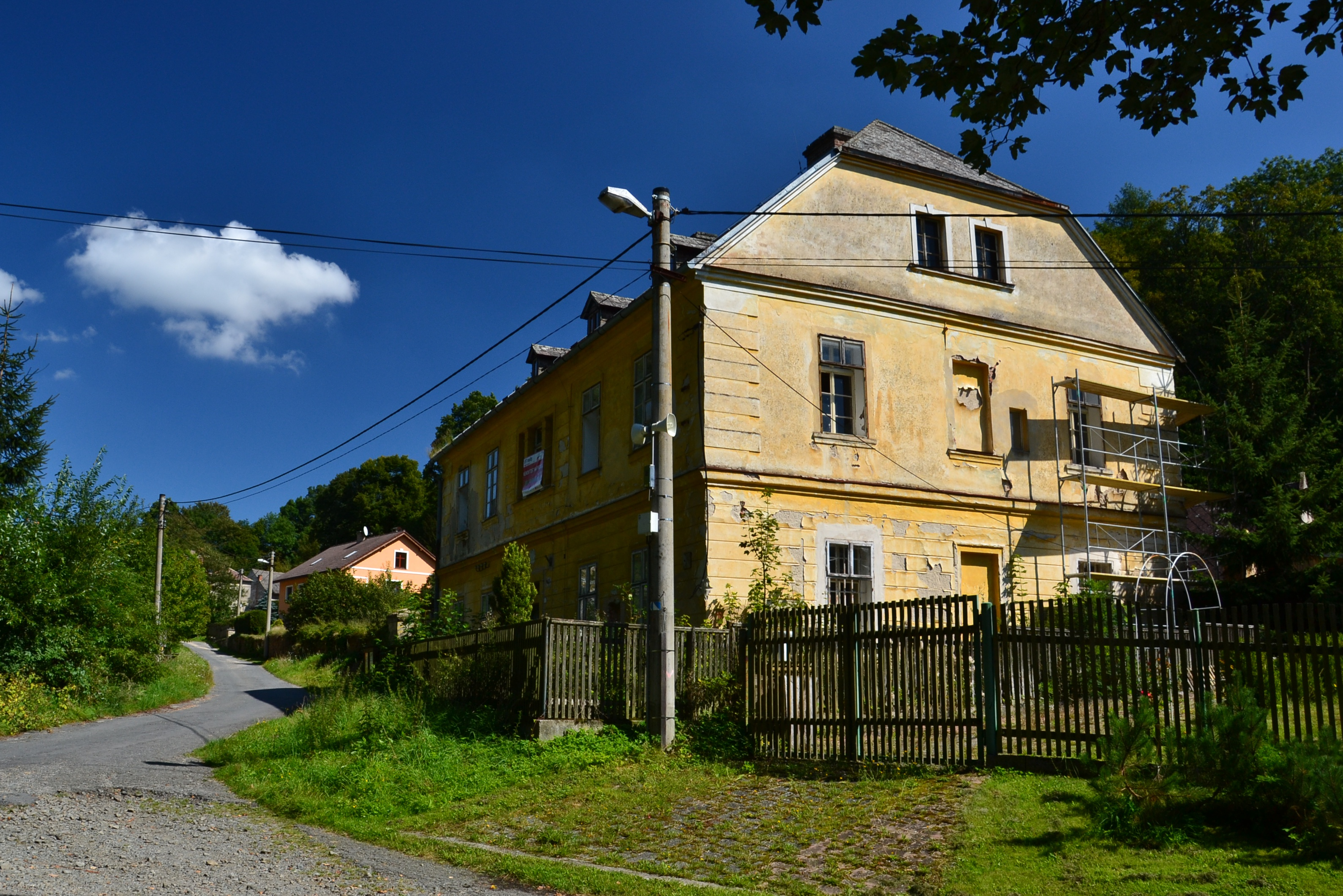 Nové Městečko - dům čp. 2